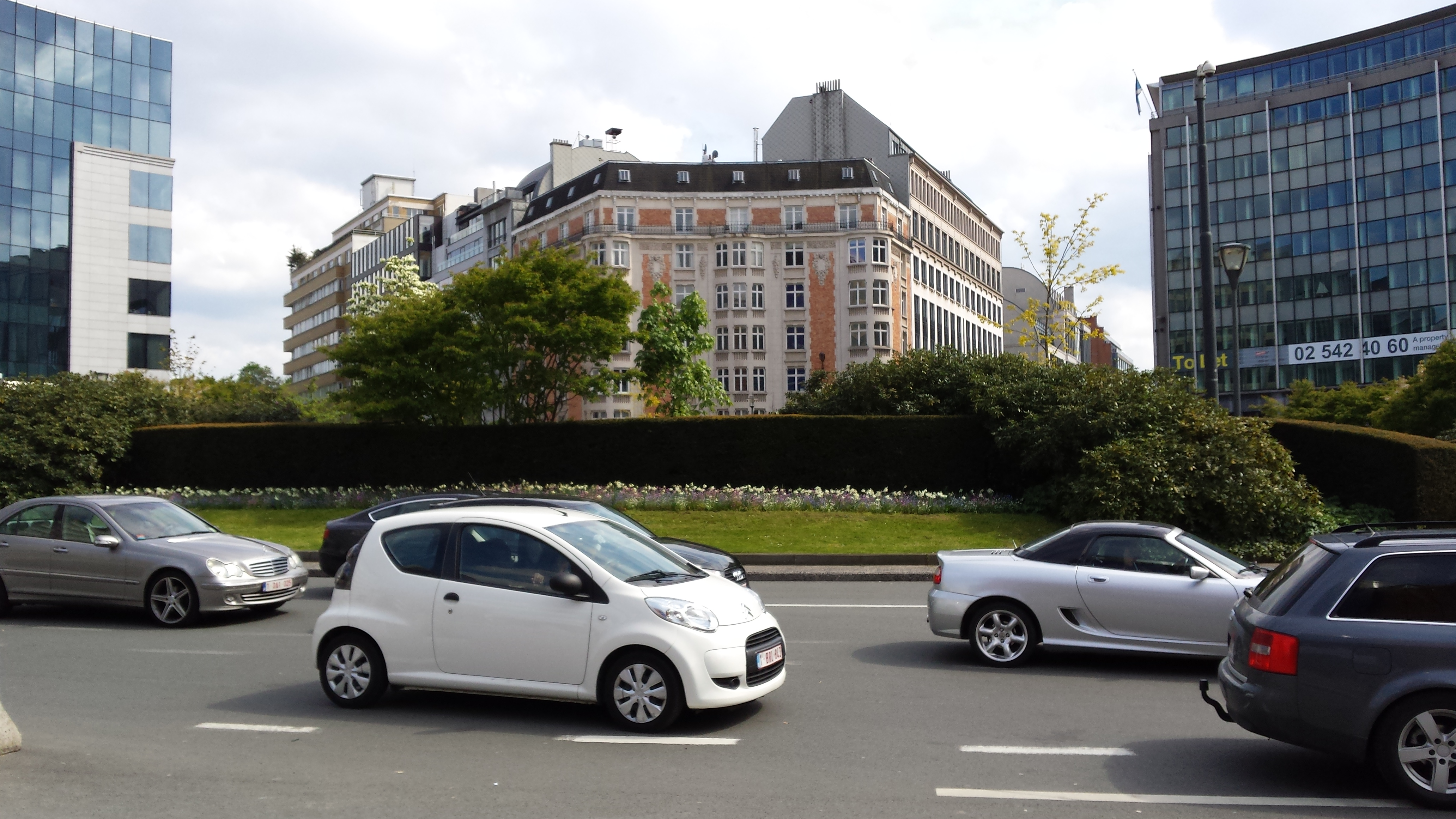 Rondo Schumana w Brukseli